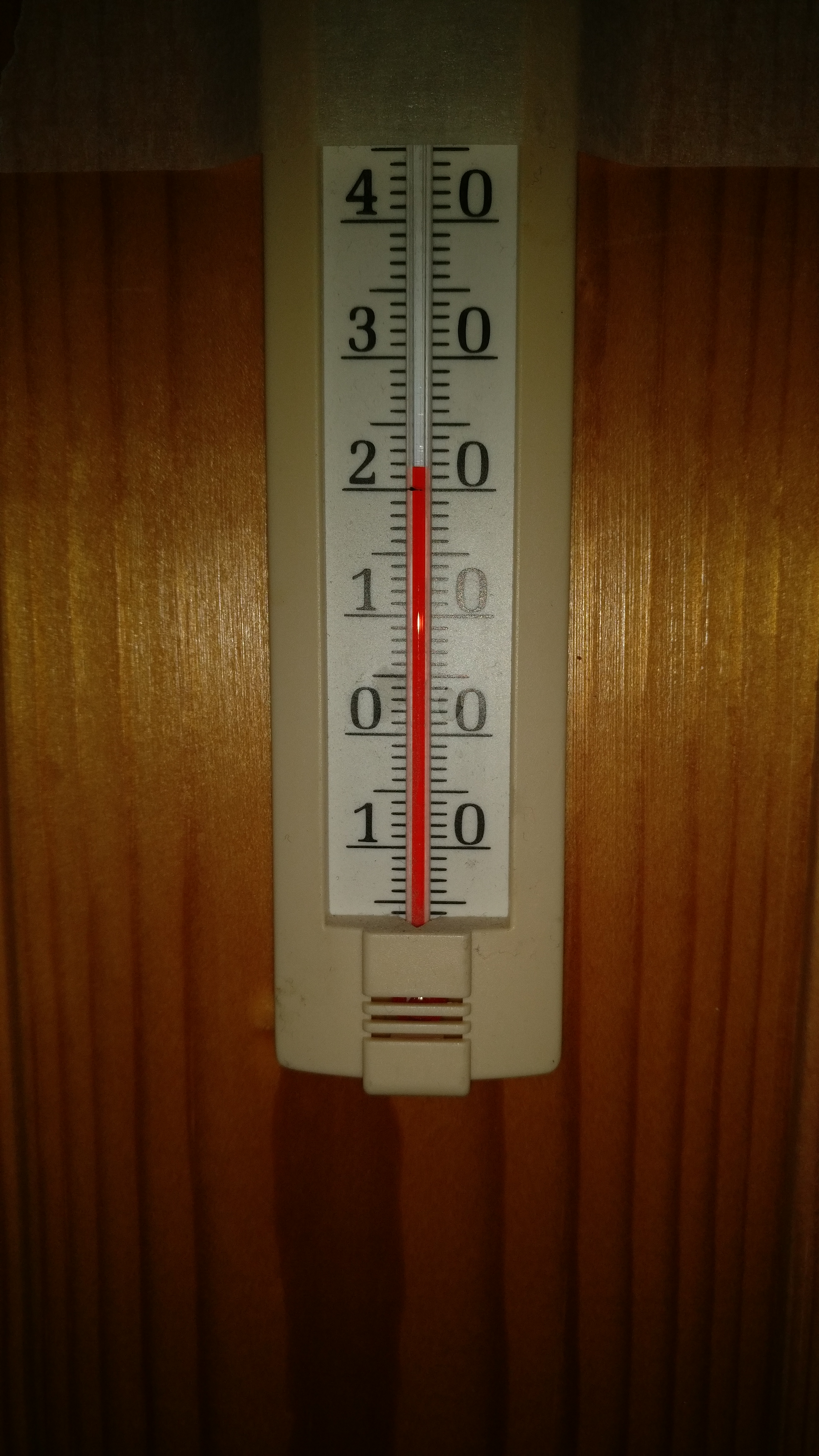 Lämpömittari, joka näyttää 22 °C:n sisälämpötilaa.